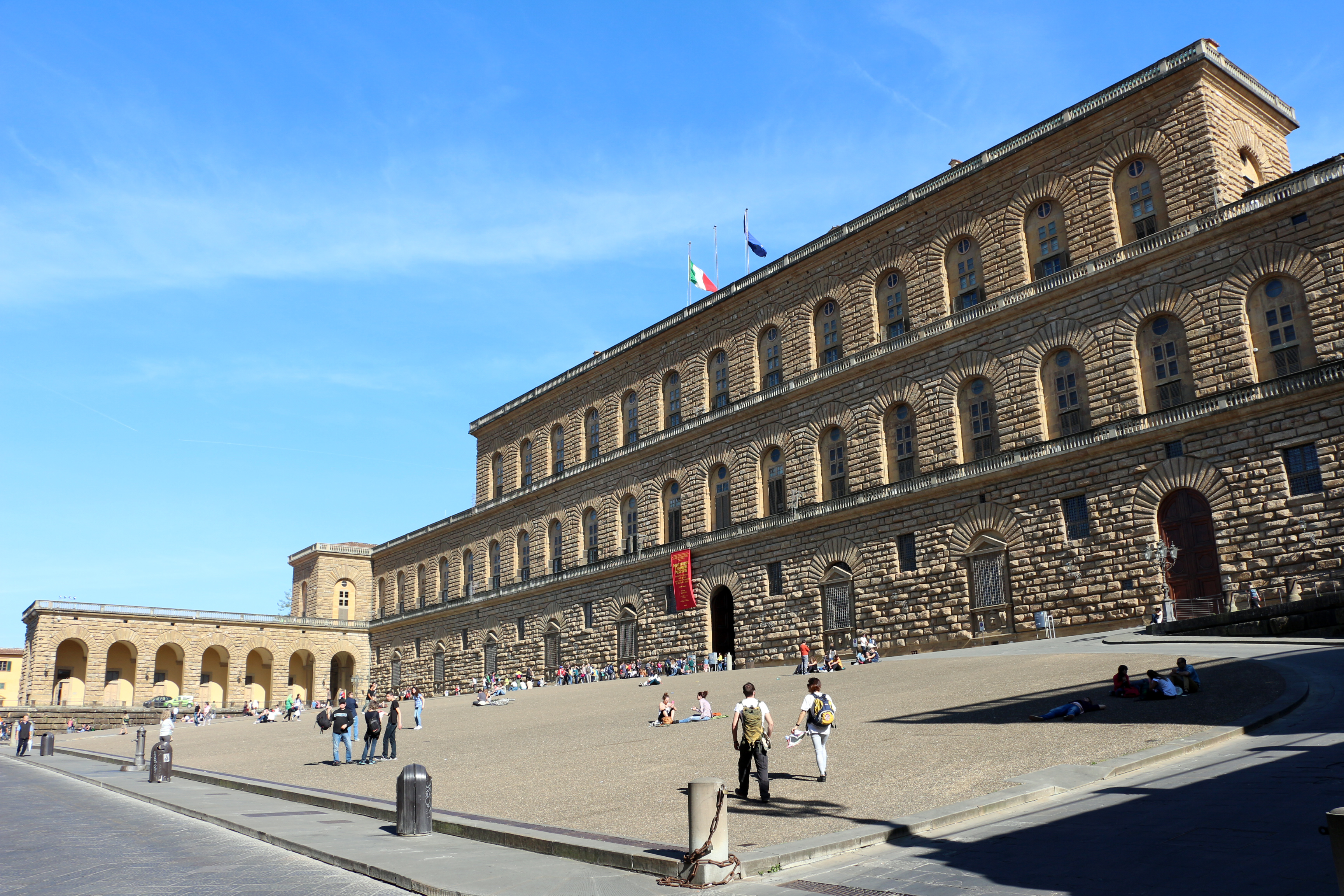 Firenze, miscellanea